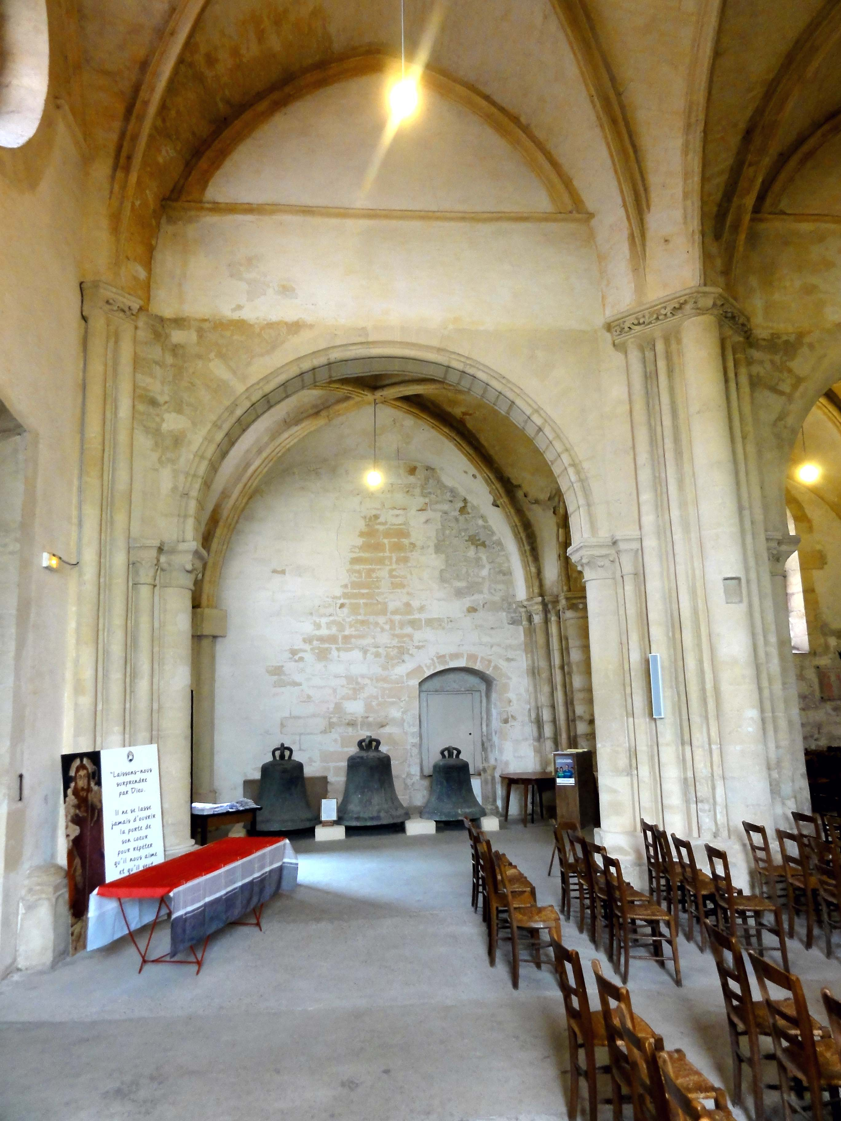 Intérieur de l'église - voir titre.